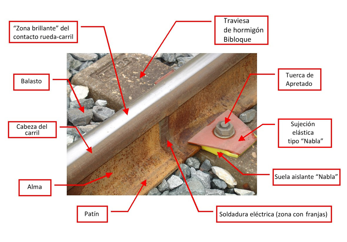 Parties d'une voie de chemin de fer